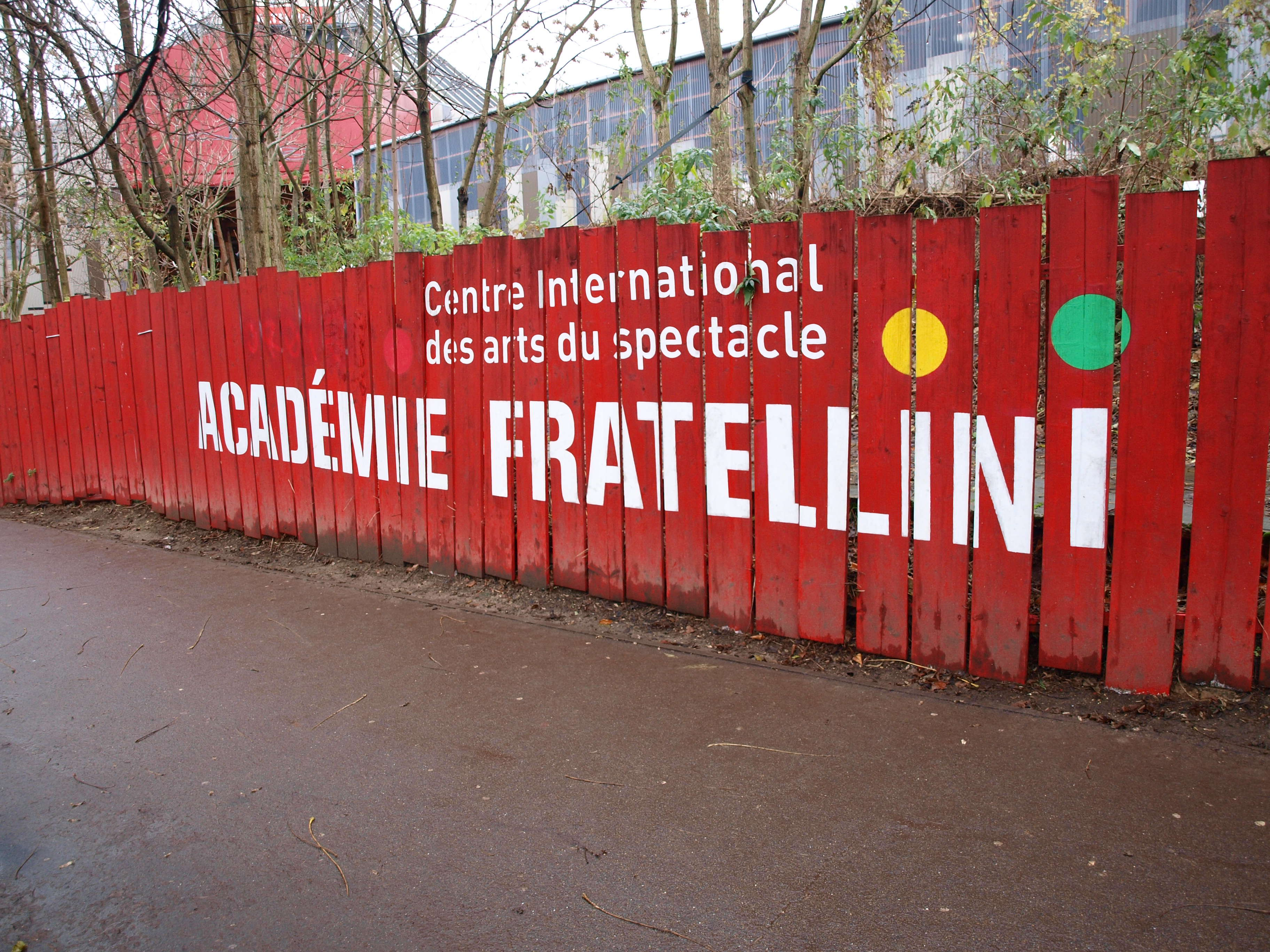 Centre international des arts du spectacle - Académie Fratellini à Saint-Denis (Seine-Saint-Denis, France)